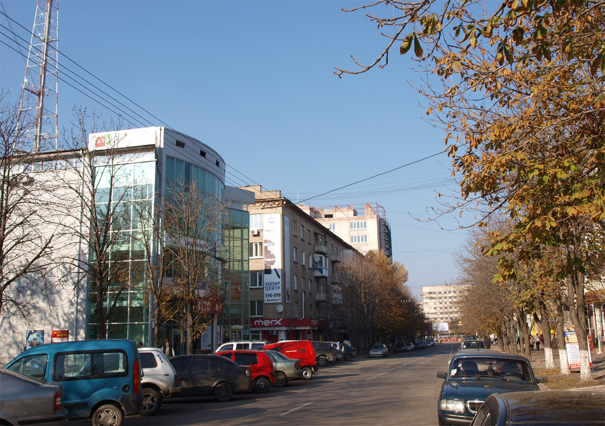 Улица Демехина в Луганске.